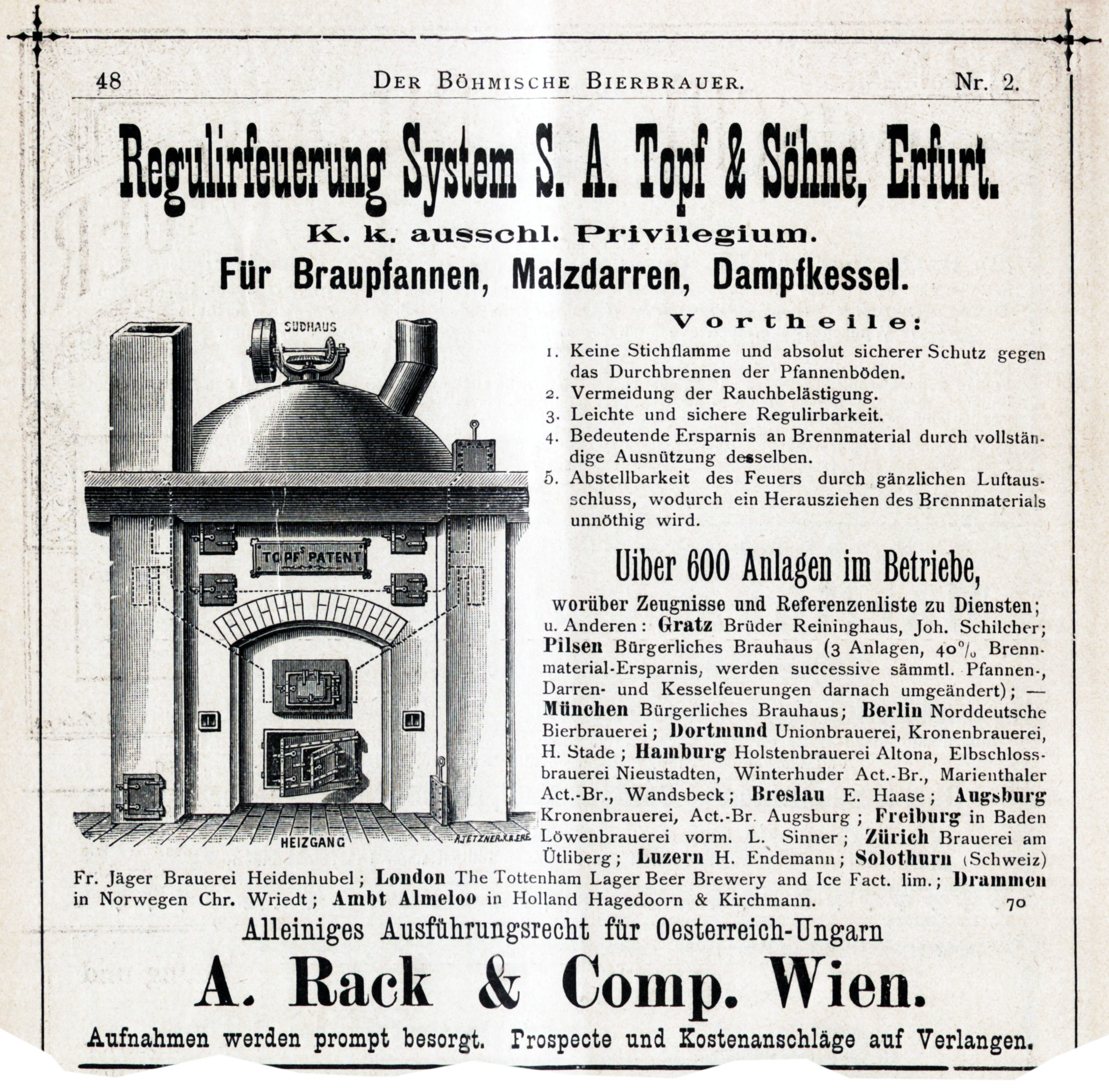 (Ausriss:) Werbeeinschaltung Regulirfeuerung System S. A. Topf & Söhne, Erfurt in: Der Böhmische Bierbrauer, Heft Nr. 2/1891